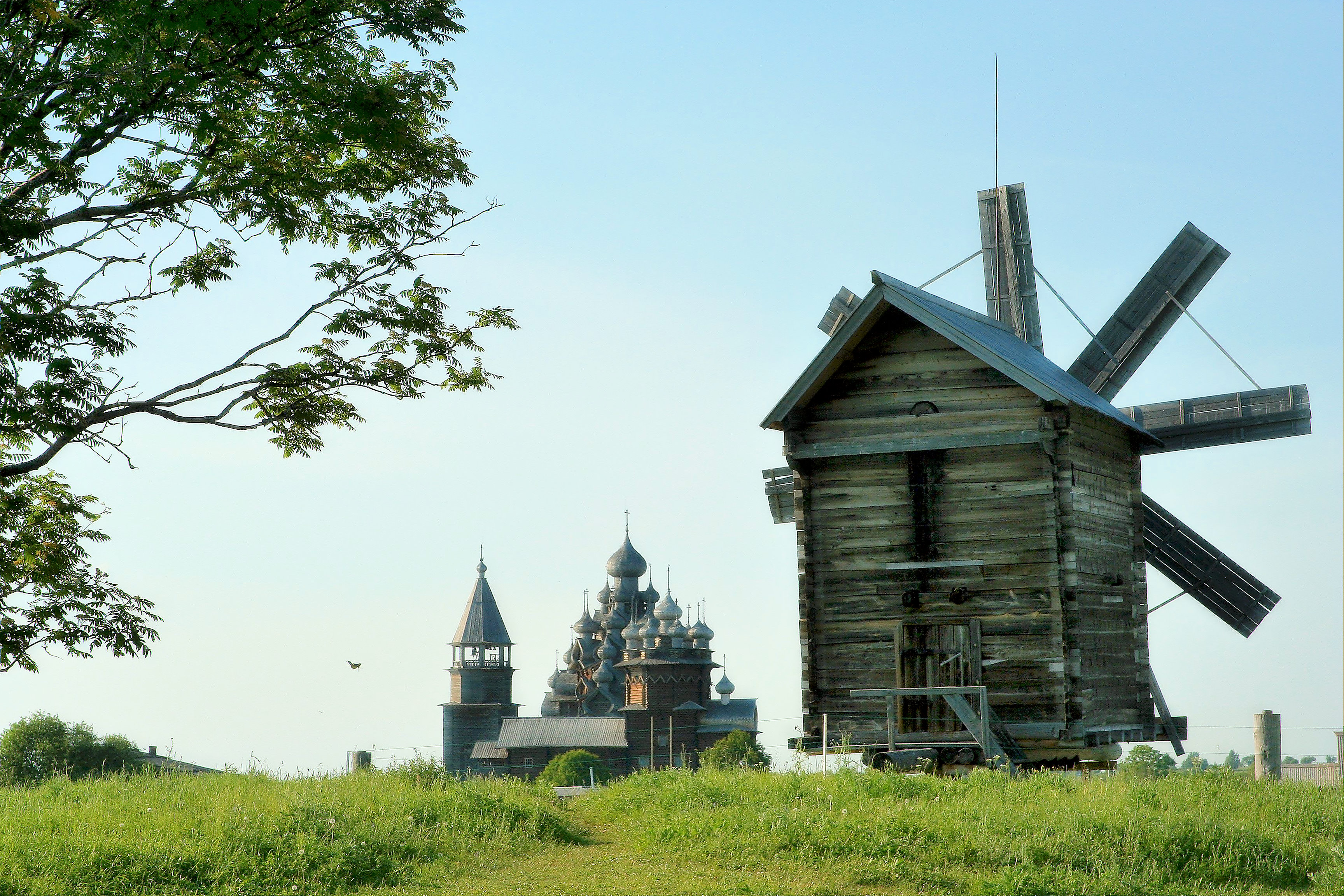 Ветряная мельница из деревни Волкостров на фоне Кижского погоста